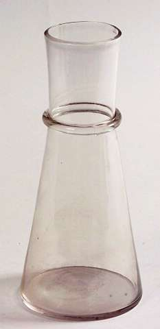 Vannkaraffel fra første halvdel av 1900-tallet, nå i samlingene på Norsk Folkemuseum. Høyde 22,5 cm. NF.1911-1053.